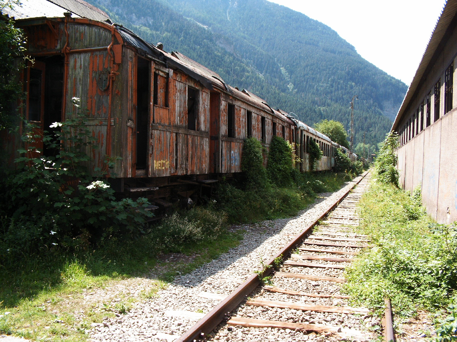 Tren abandonado en la Estación Internacional de Canfranc.